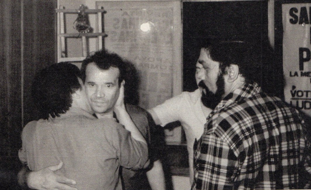 Herminio Iglesias, candidato a gobernador de Buenos Aires por el Partido Justicialista, se entera de su derrota electoral ante Alejandro Armendáriz, candidato de la Unión Cívica Radical.